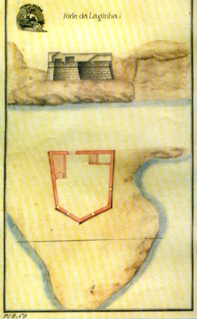 "Forte da Laginha", s/d, autor desconhecido, Arquivo Histórico Militar, Lisboa. in MARTINS, José Salgado, "Património Edificado da Ilha Terceira: o Passado e o Presente". Separata da "Atlântida", vol. LII, 2007. p. 31. Também integrante da "Colecção de Plantas e Alçados de 32 Fortalezas dos Açores, por Joze Rodrigo d'Almeida em 1830", José Rodrigo de Almeida, 1830 (c.) GEAEM (346-1-8A-96), Lisboa, Portugal.